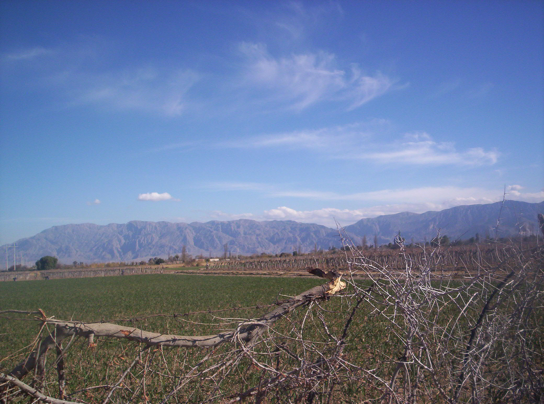 Vista a las plantaciones de en la zona oeste departamento Rawson, en San Juan Argentina